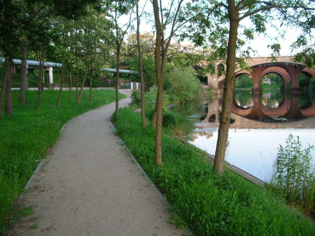 Brda w Bydgoszczy - Okole